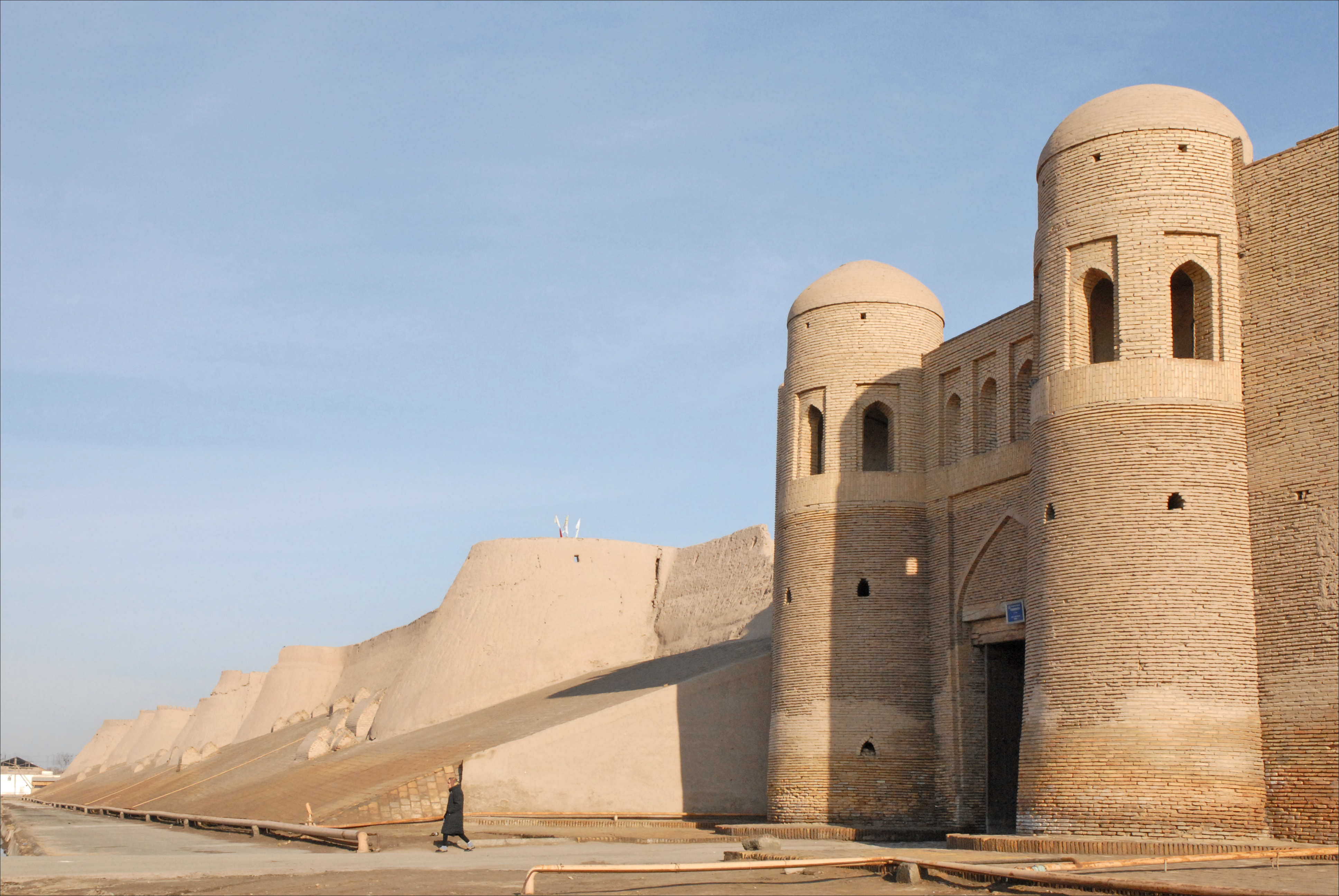 Restaurée à l'époque soviétique, la ville ancienne de Khiva (Ichan Kala) a été inscrite par l'UNESCO sur la liste du patrimoine mondial. C'est devenue une ville-musée mais près de 1500 familles y vivent aujourd'hui. Elle est située dans la région du Khorezm, très proche de la frontière avec le Turkménistan. Cette oasis sur la route de la soie est habitée depuis plus de 2.500 ans. Elle est entourée de murailles en terre séchée (pisé) et en briques et comprend de nombreux bâtiments religieux : mosquées et minarets, médersas, mausolées, palais..